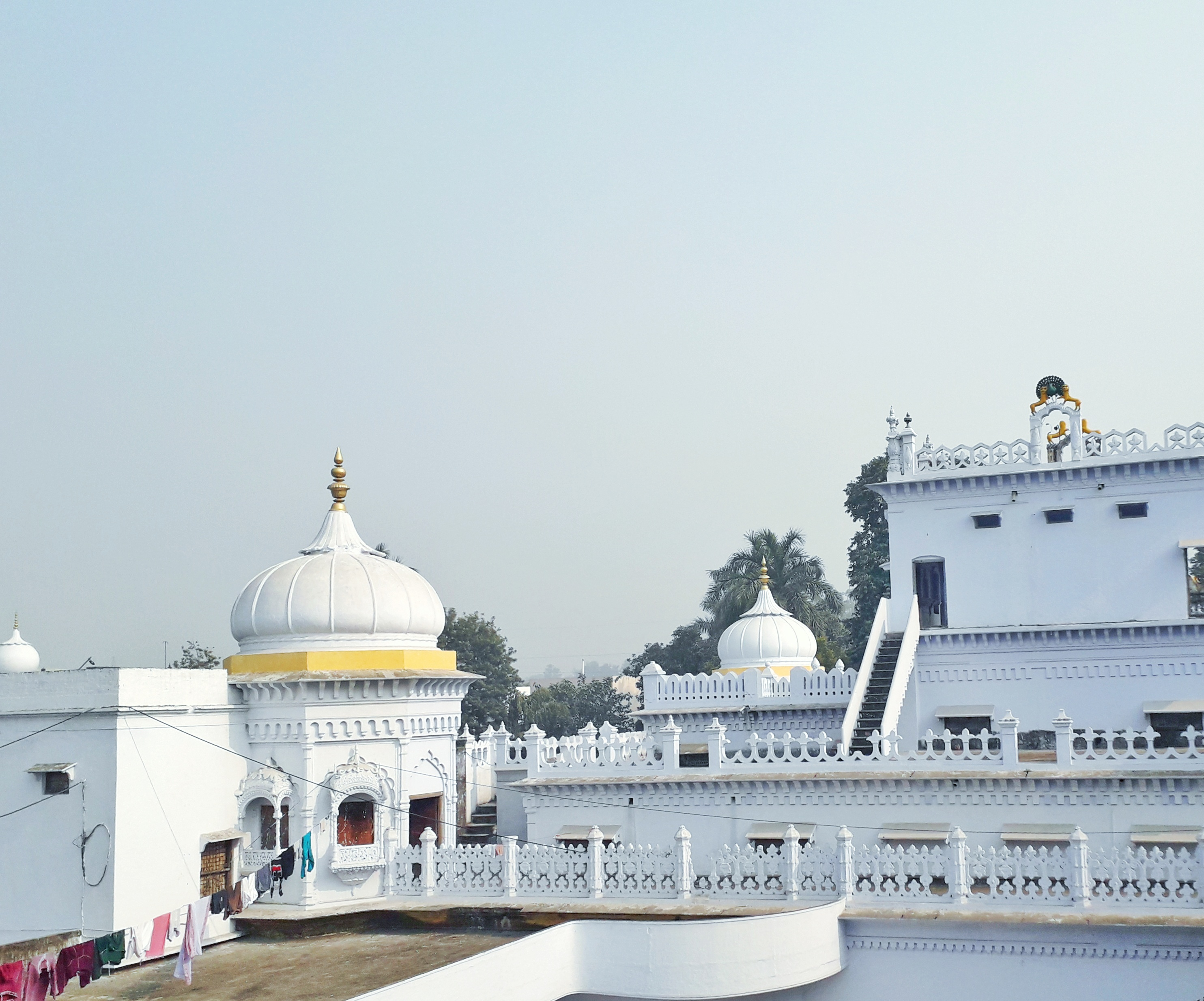 Biabani Kothi, Bareilly